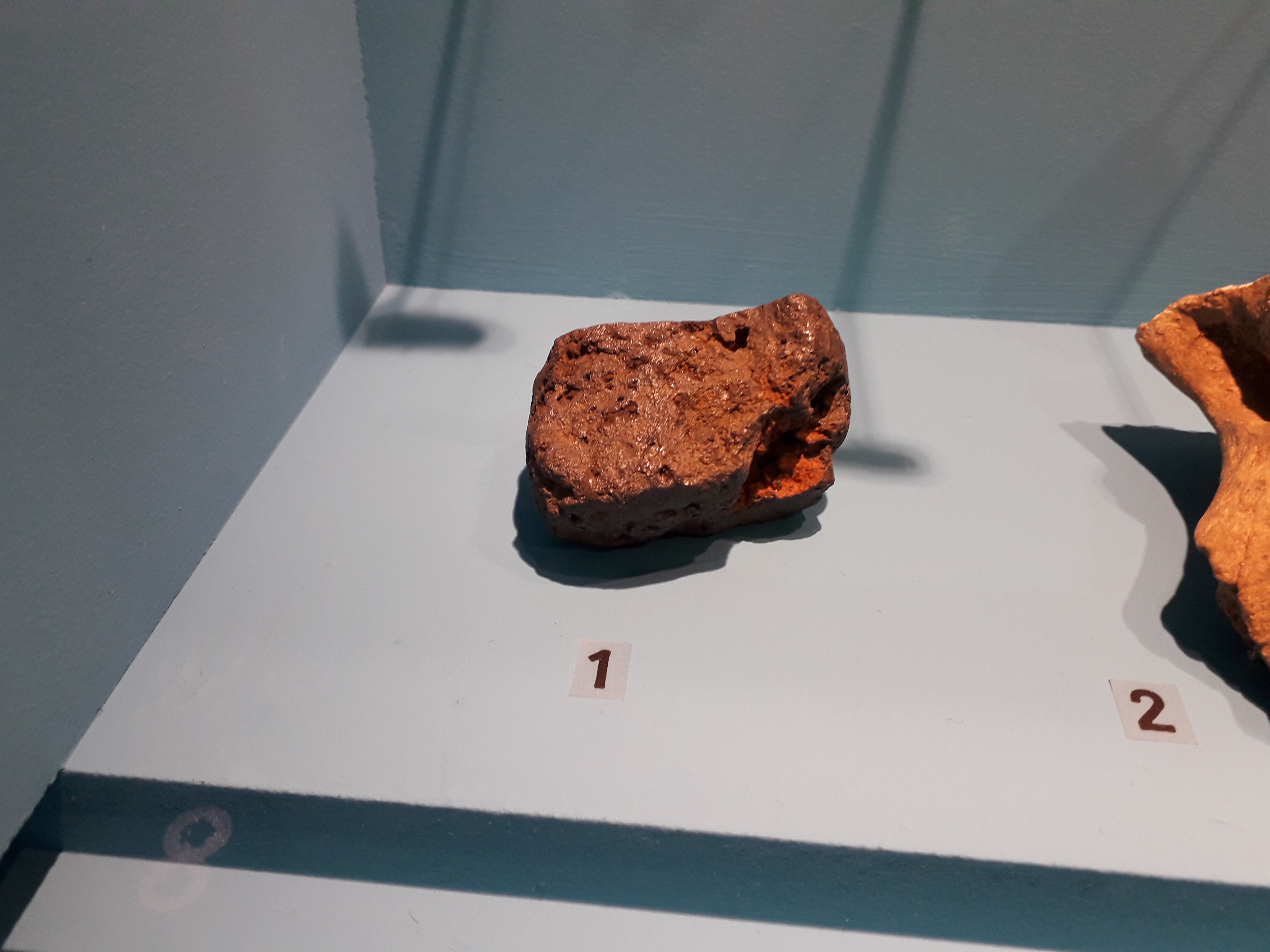 Pigments, oxyde de manganèse et ocre. Site du "Pech-de-l'Azé" en Dordogne, en France. Période : Paléolithique moyen. Collections du Musée national de Préhistoire, Les-Eyzies-de-Tayac. Photographié à l'exposition "Néandertal, l'expo" au musée de l'Homme à Paris en avril 2018.